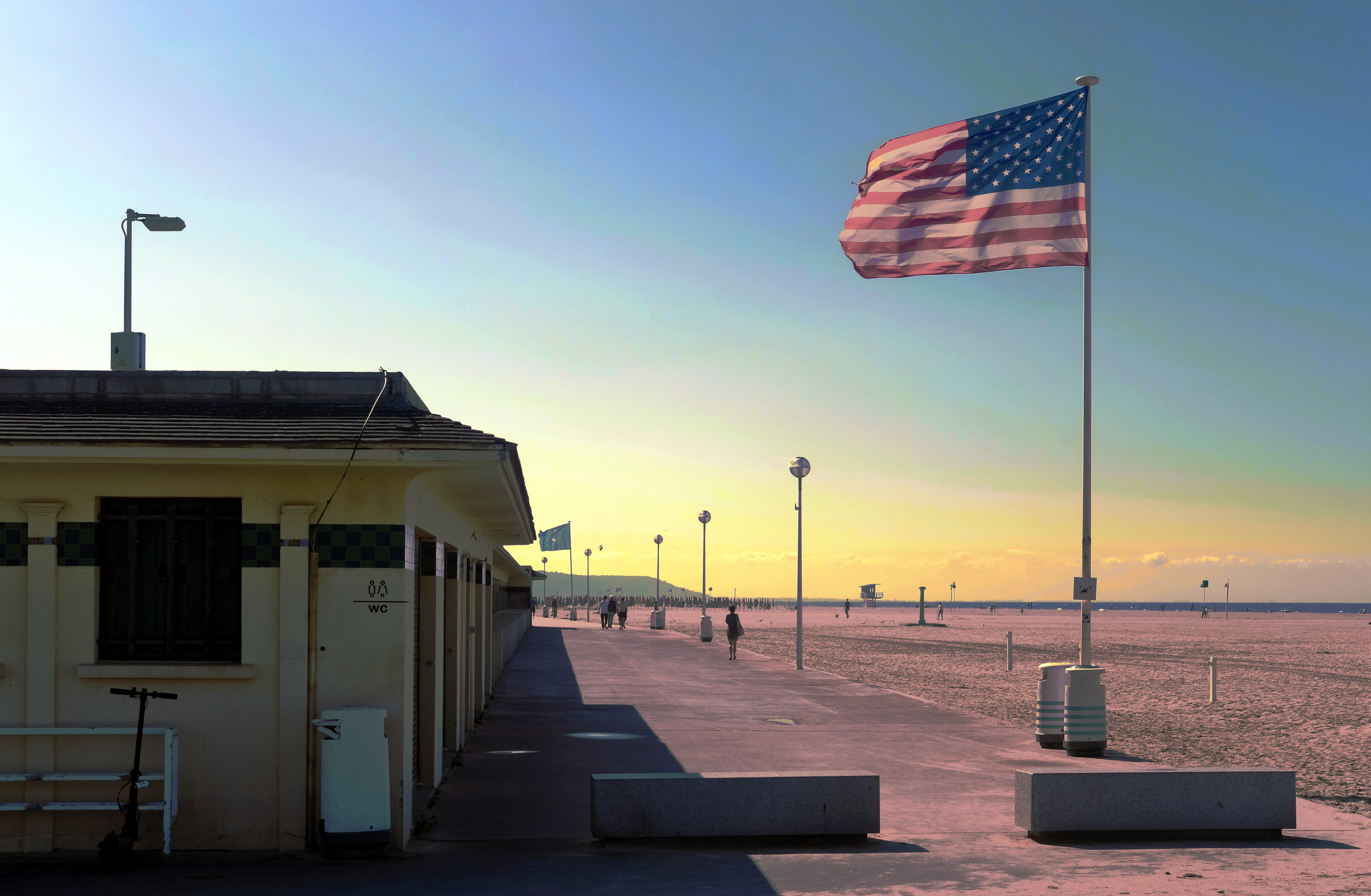 Deauville - La promenade